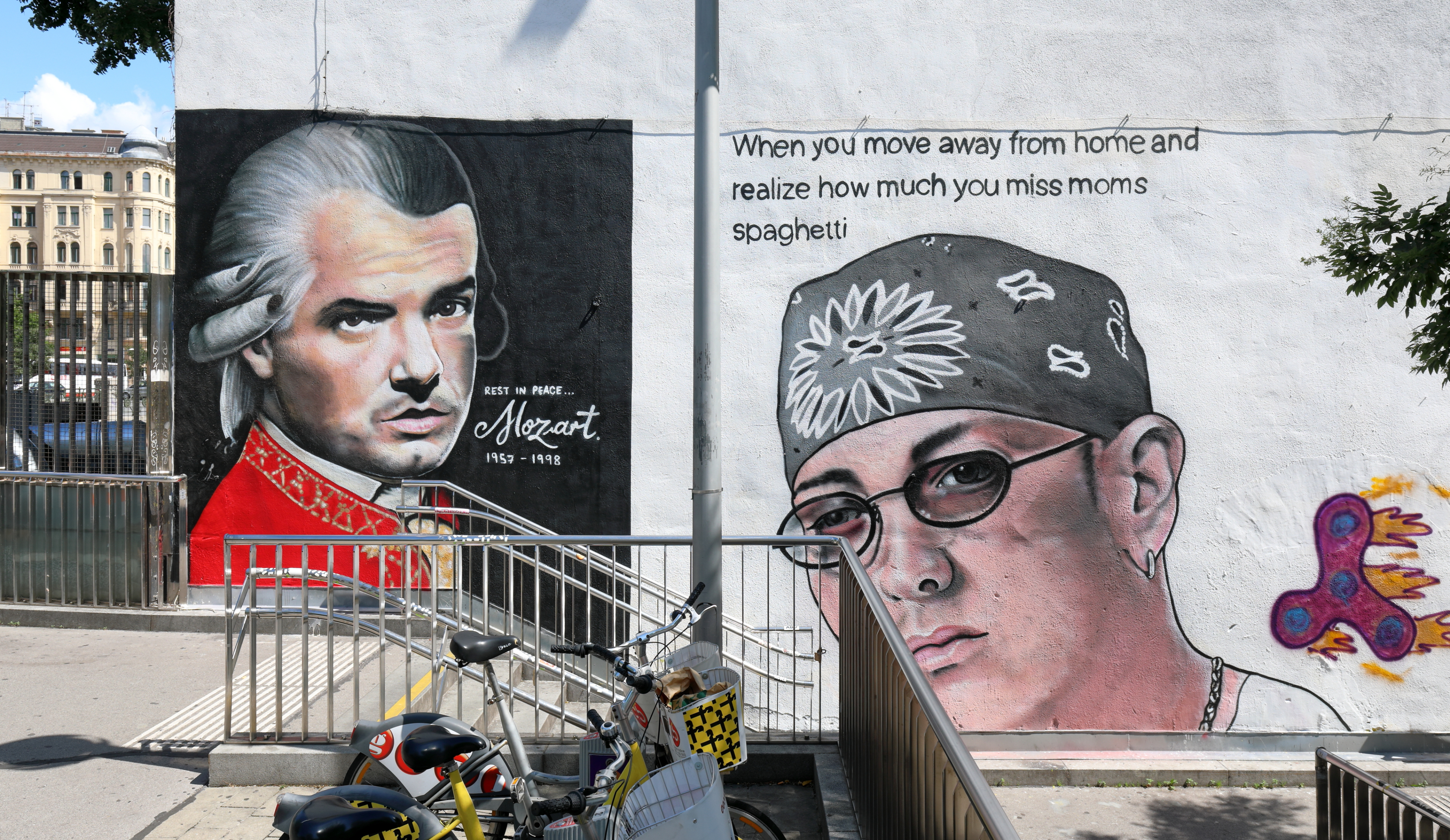 2 Graffiti von dem australischen Graffiti-Künstler Lush Sux bei der Falco-Stiege nächst der U-Bahnstation Kettenbrückengasse in der österreichischen Bundeshauptstadt Wien. Die Graffiti stellen den Falco mit Mozart-Outfit (in Anspielung auf seinen Welthit Rock Me Amadeus) und den US-Hip Hopper Eminem dar, um subtil die Frage aufzuwerfen, wer jetzt wirklich der größte Rapper der Musikgeschichte ist.